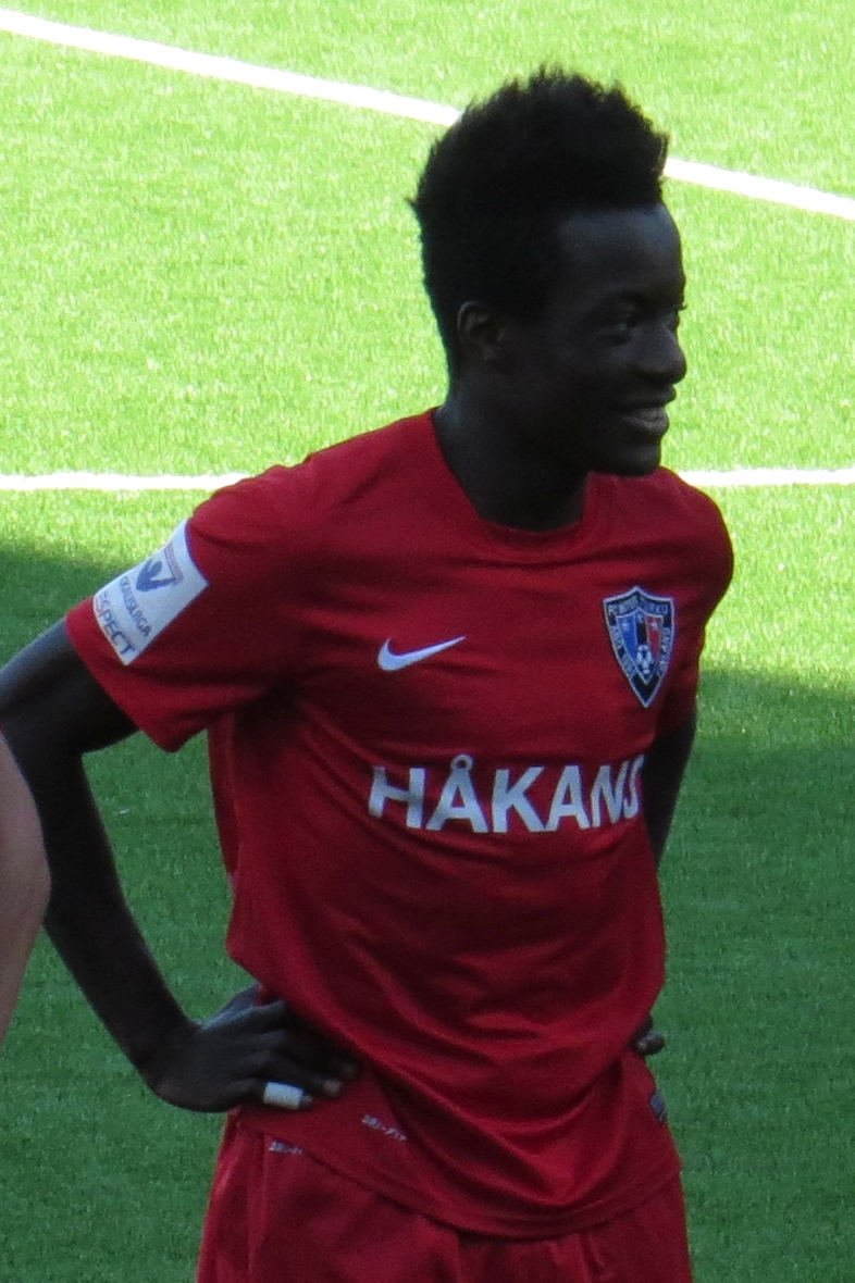 Solomon Duah, suomalainen jalkapalloilija FC Inter Turun joukkueessa kaudella 2015.